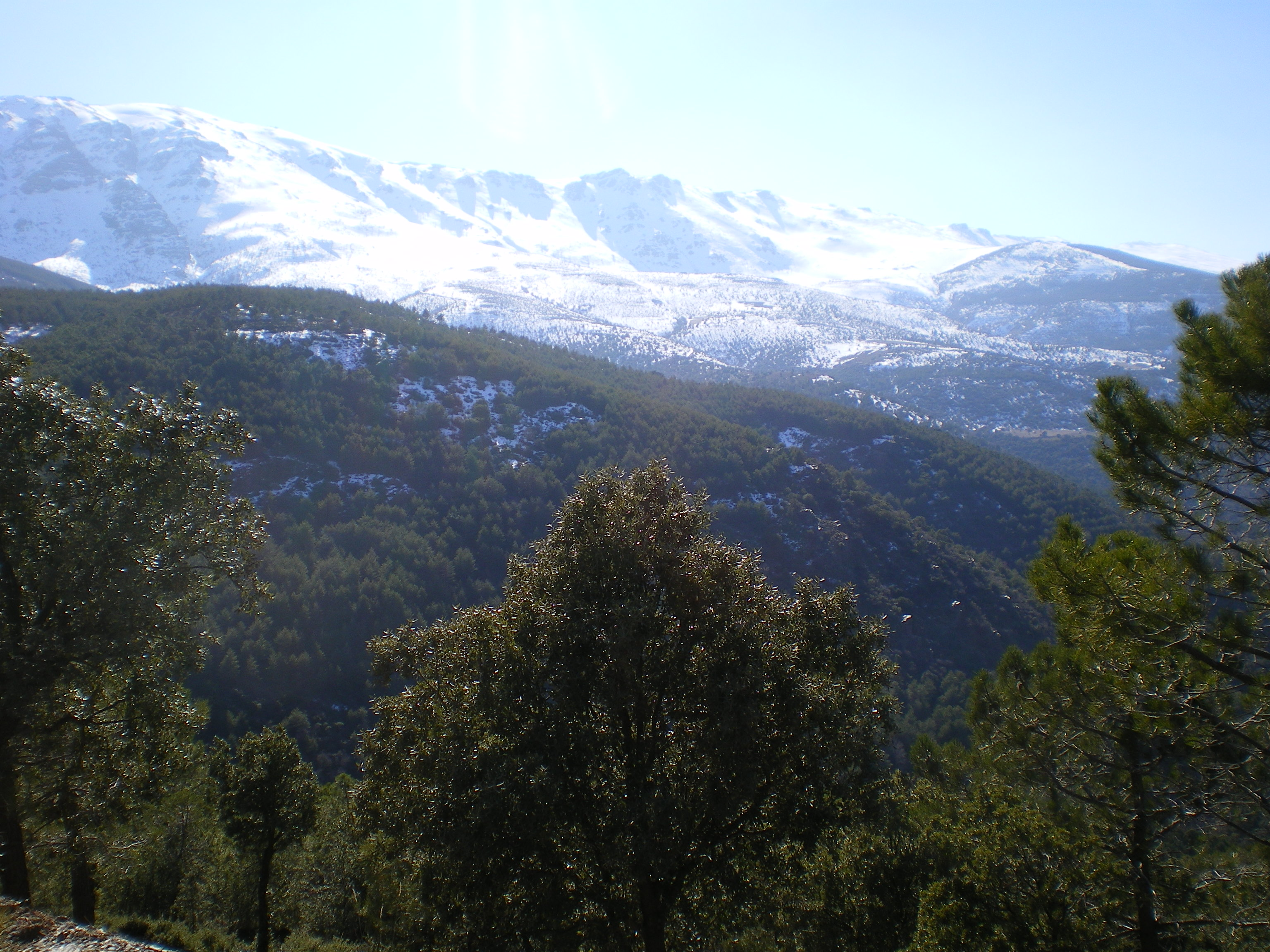 Fotografía de la Sierra Nevada de Almería, España, su vertiente norte desde El Ubeire, municipio de Fiñana, provincia de Almería.